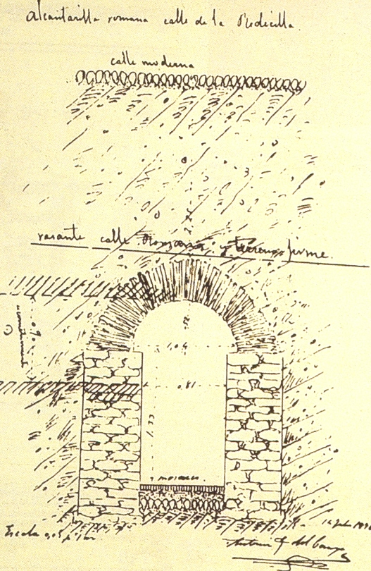 Dibujo de la cloaca romana de Astorga (León, España), por Antonio García del Campo. Museo Romano de Astorga.